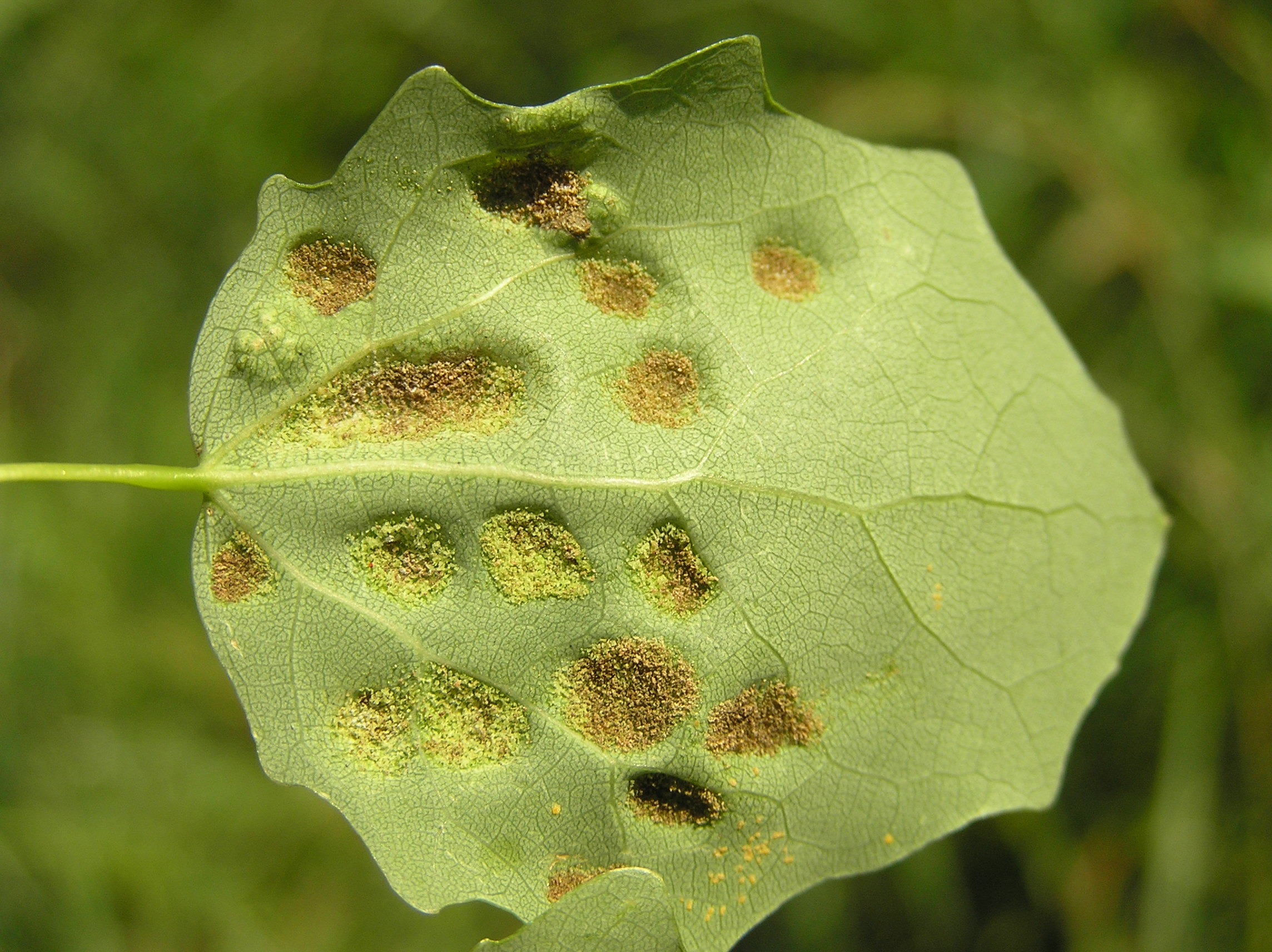 Phyllocoptes populi Nal.; (Szpeciel) Białowieża, Polska